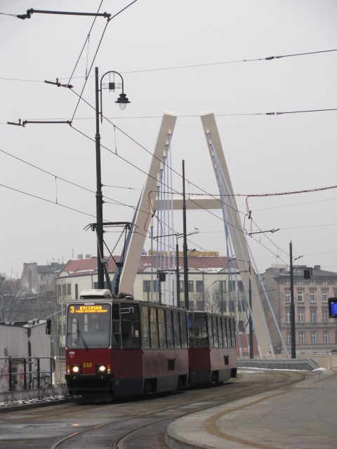 Nowy Most tramwajowy